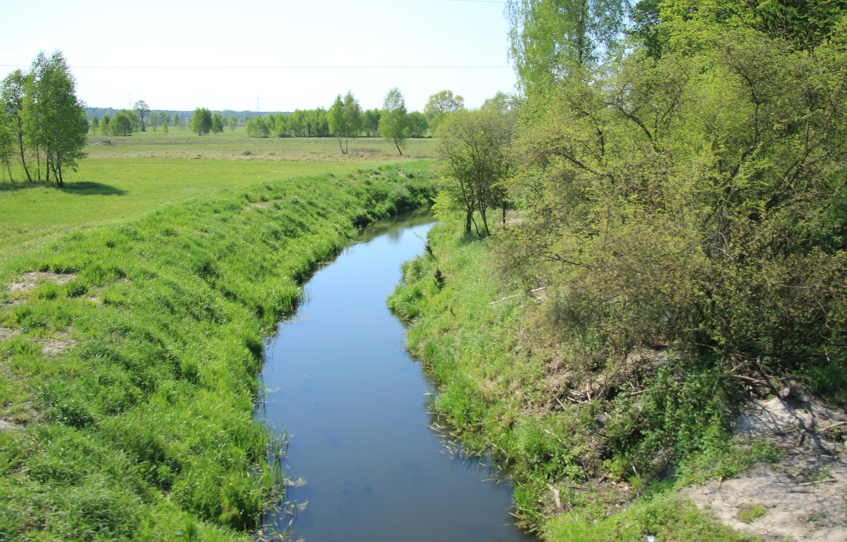 Beniaminówka - sztuczny ciek wodny k. Radzymina